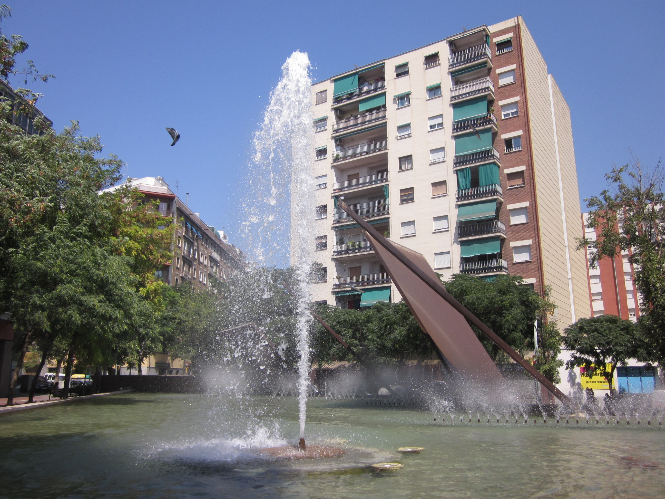 Plaça d'Islàndia, Barcelona.